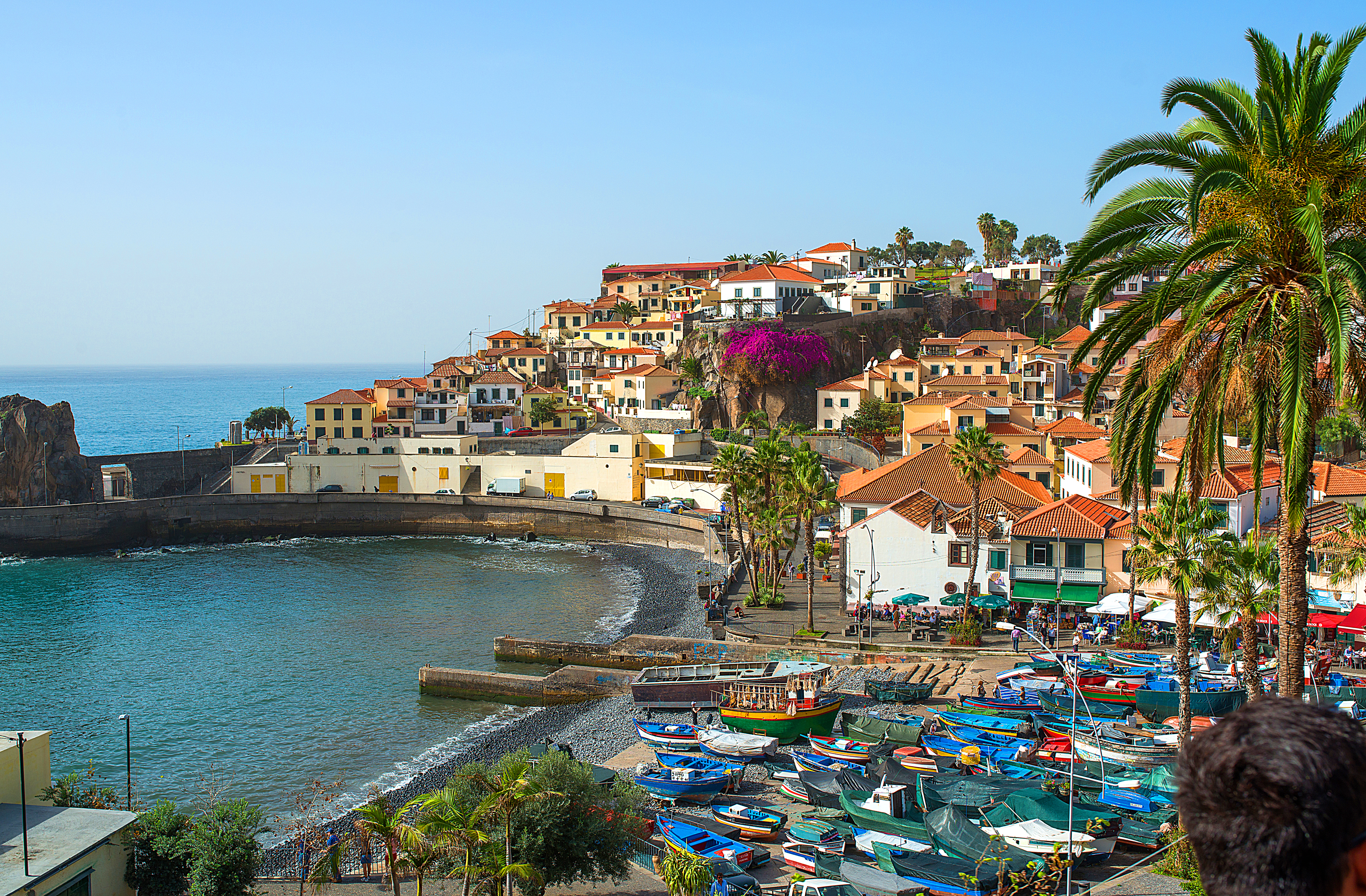 Camara de Lobos, Madeira Portugal January 2014